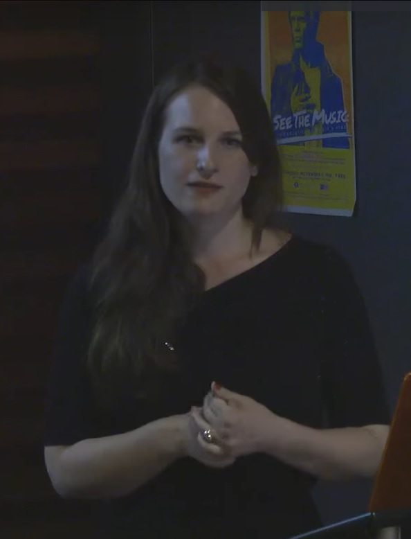 A Conversation between Line Hoven and Nora Krug 16.06.2017